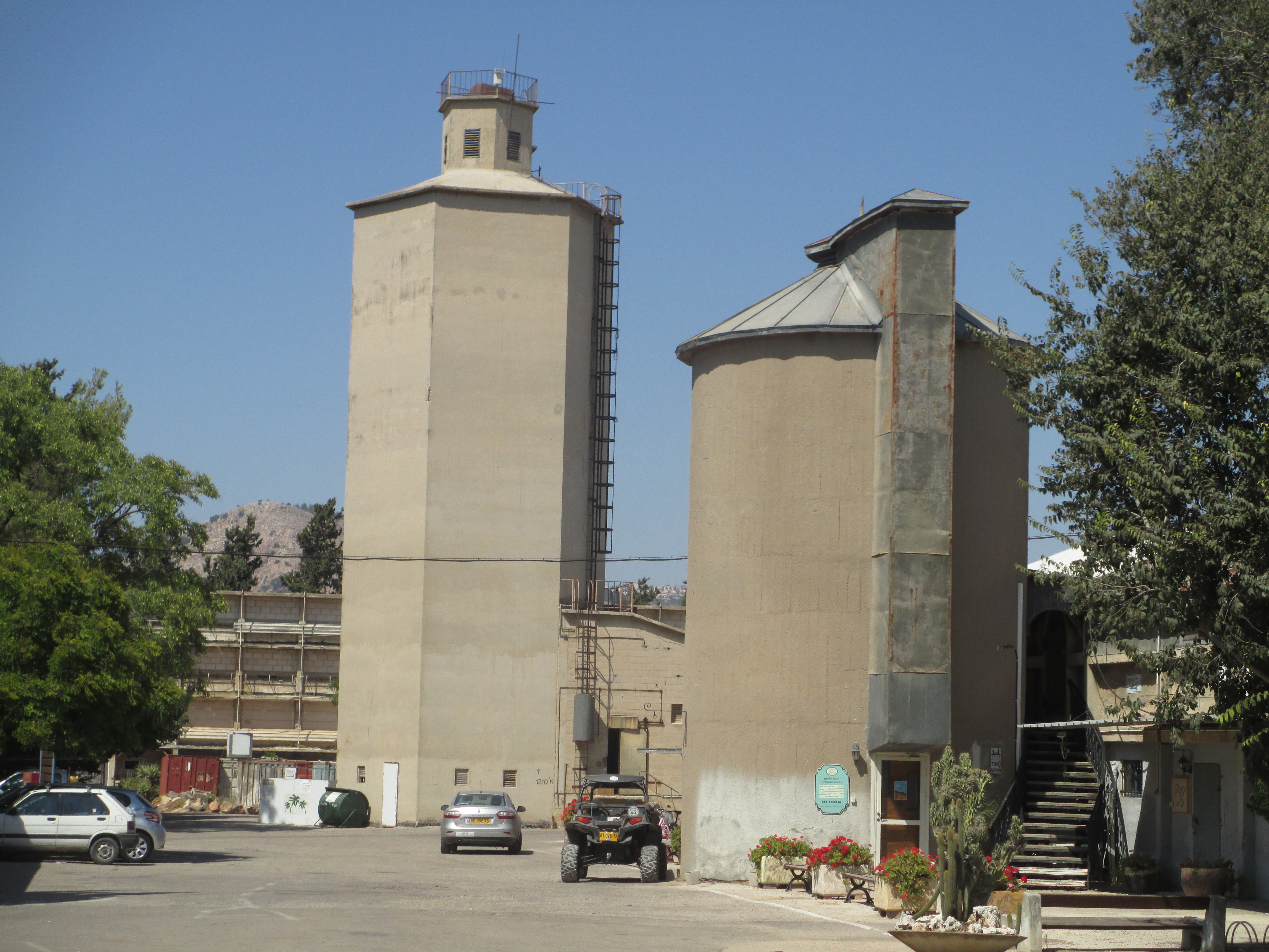 מגדלי סילו בקיבוץ מזרע